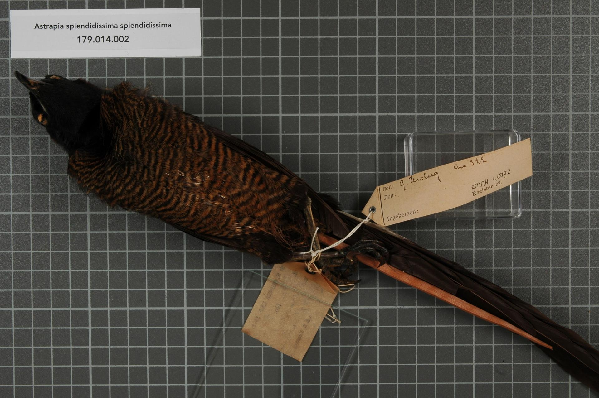 Astrapia splendidissima splendidissima Rothschild, 1895